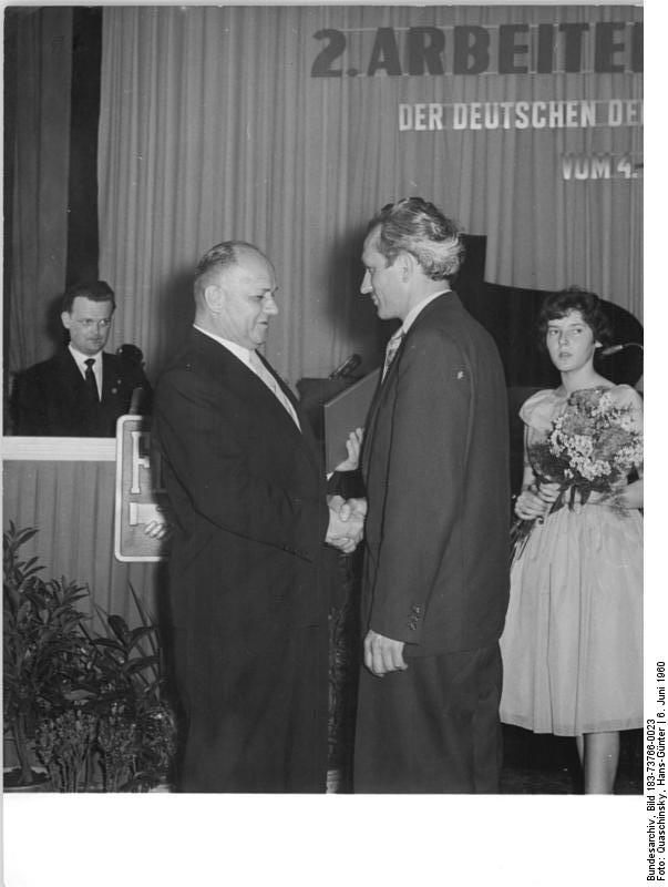 Zentralbild Quaschinski 7.6.1960 2. Arbeiterfestspiele des FDGB. Auszeichnung mit dem Kunst- und Literaturpreis 1960. Auf einem Empfang des Bundesvorstandes des FDGB wurde am 6.6.1960 die Verleihung des Kunst- und Literaturpreises des FDGB vom Stellvertreter des Vorsitzenden des FDGB, Walter Buchheim, vorgenommen. UBz: Walter Buchheim (rechts) überreicht Edgar Klier den Kunstpreis des FDGB 1960 für sein Gemälde "Vor Ort"